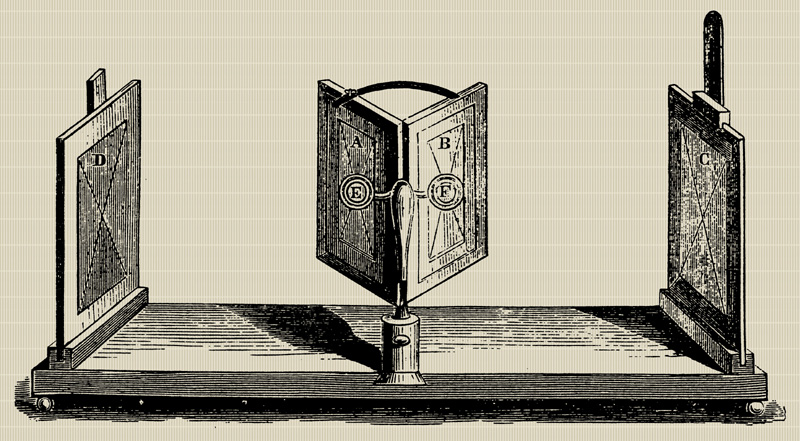 Stereoskop Charlesa Wheatstone'a - drzeworyt lata czterdzieste XIX w. (autor nieznany).